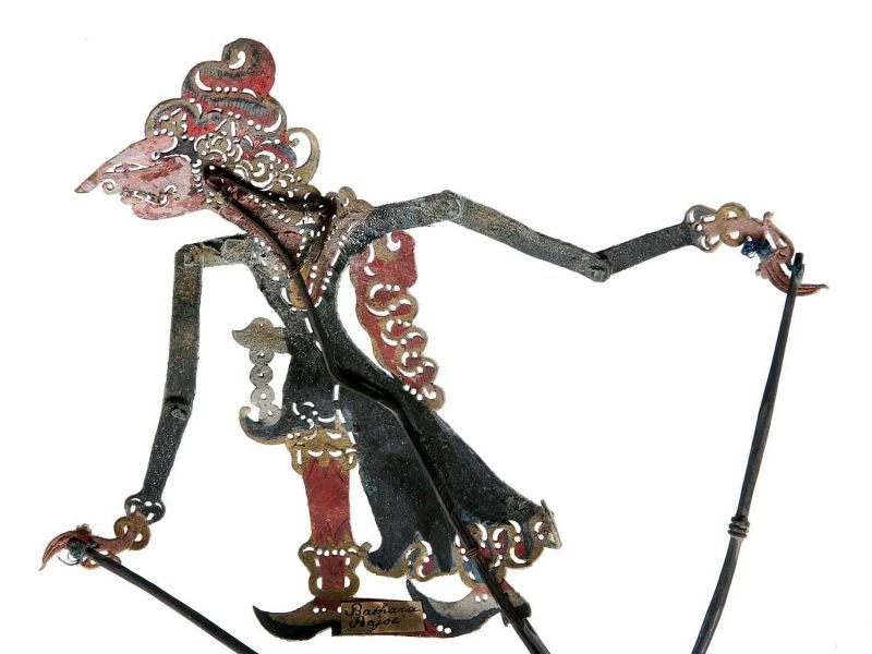 Schaduwfiguur. Wajangpop, voorstellende Batara Bayu Unknown language: Wayang kulit